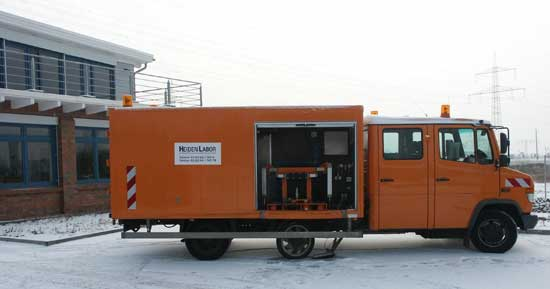 SCRIM